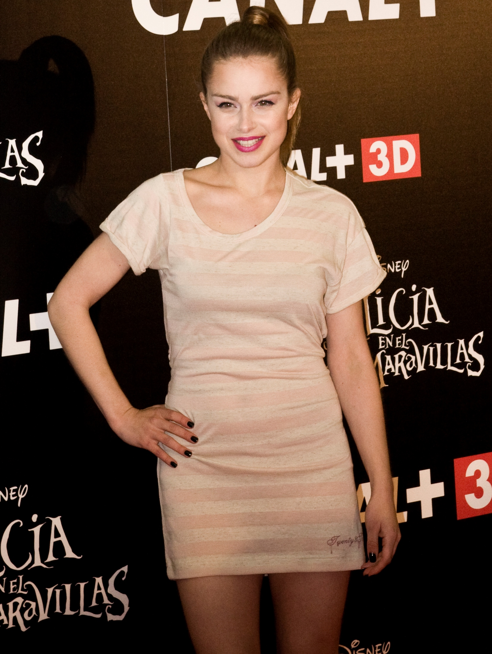 Carla Nieto actriz española, en el photocall de Alicia en el país de las Maravillas en 2010.